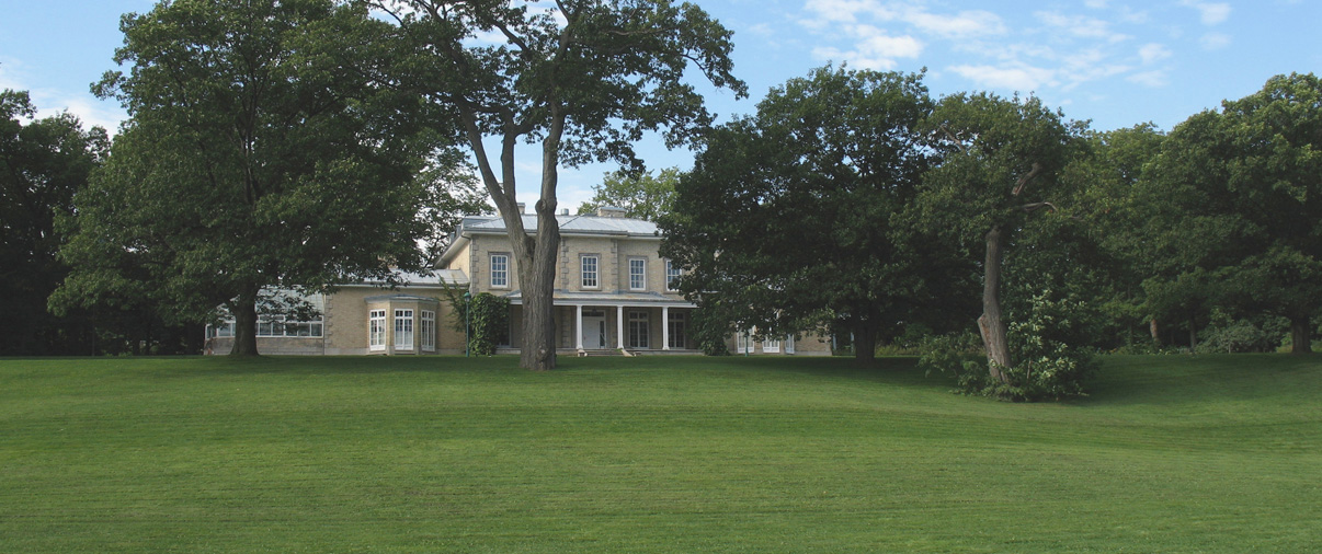 Domaine Cataraqui propriété située à Québec dans le quartier Sillery de l'arrondissement Sainte-Foy–Sillery–Cap-Rouge. Province de Québec. Canada